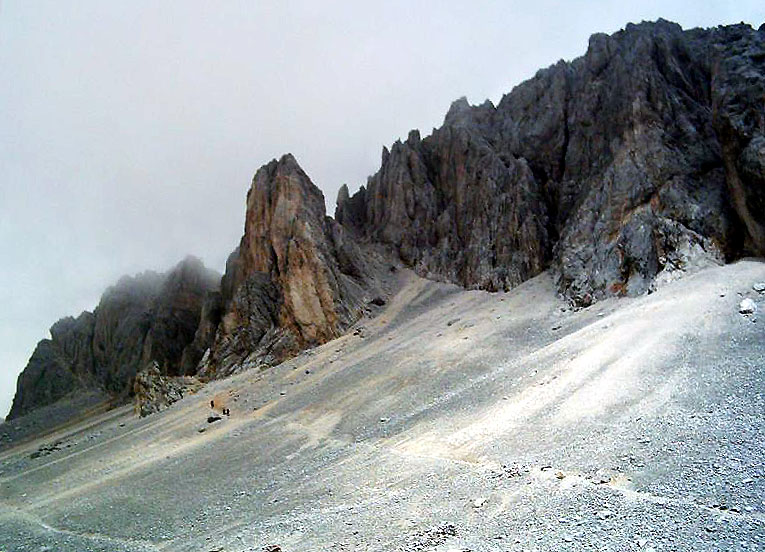 An der Großen Kinigat, Karnischer Höhenweg